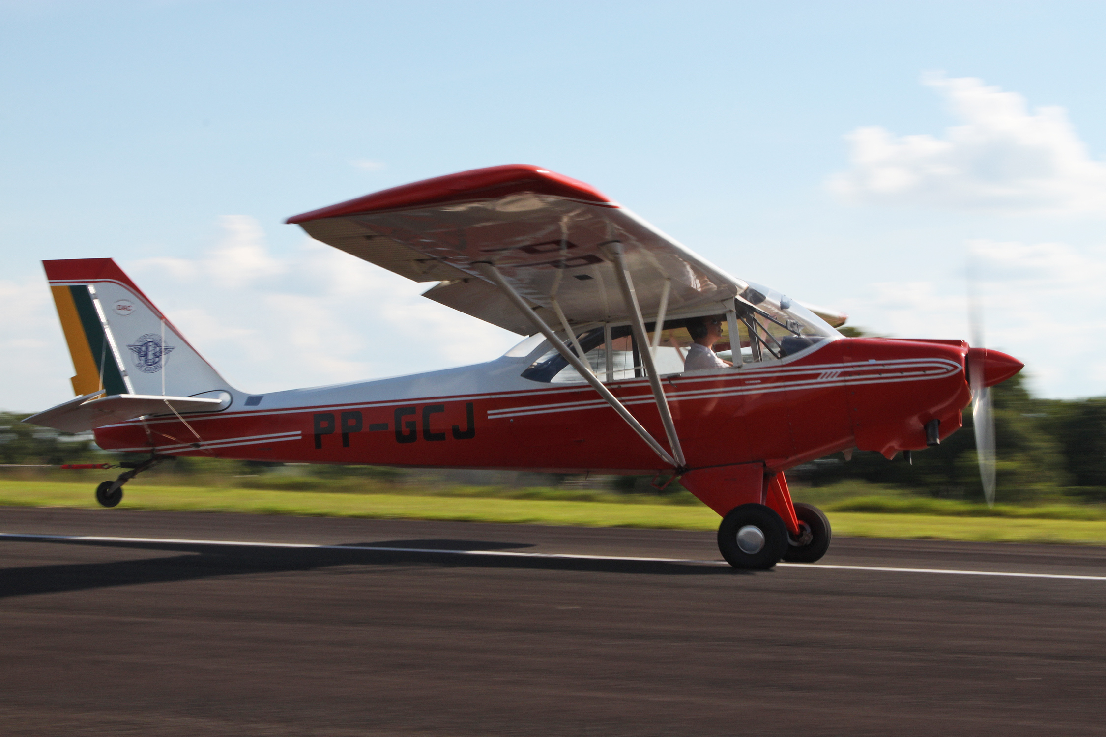 Monomotor Aero Boero AB-180 decolando do Aeroporto de Bauru